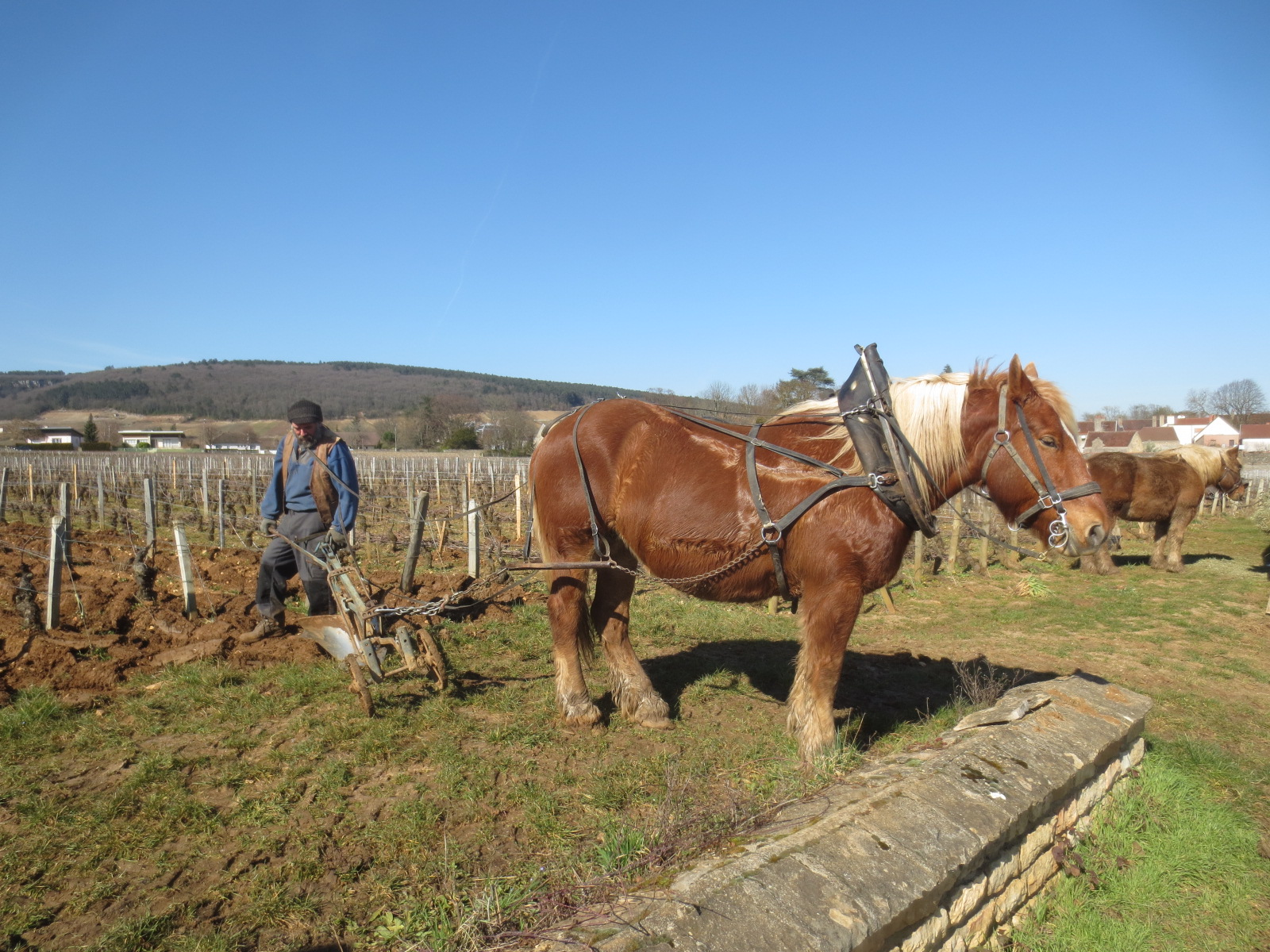 Laboure traditionnelle des Mazis-chambertin en Bourgogne avec un cheval comtois (Eric André et Opaline sur